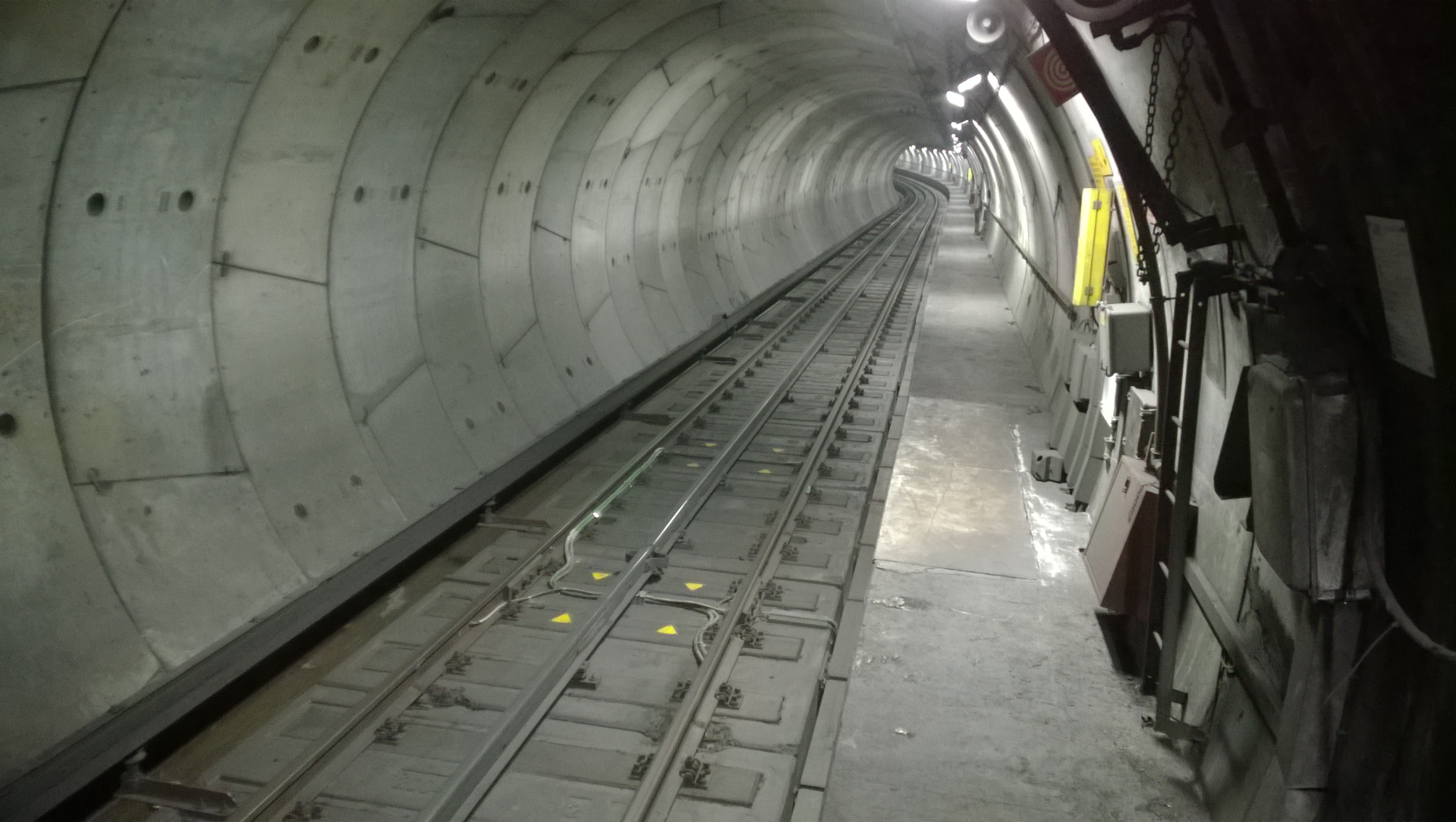 Galleria a binario singolo della linea M1 della metropolitana di Milano presso la stazione di Pero.